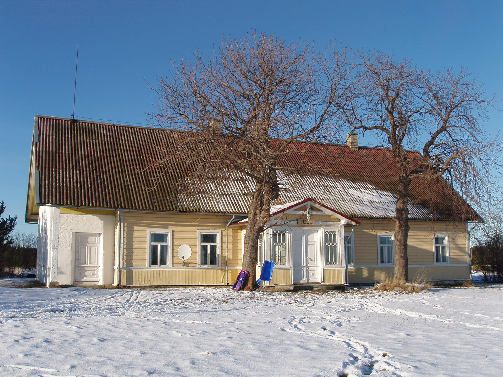 Tolli talu Vilsandi saarel